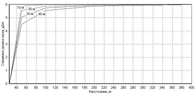 Намалението на нивото на звука при удвояване на разстоянието